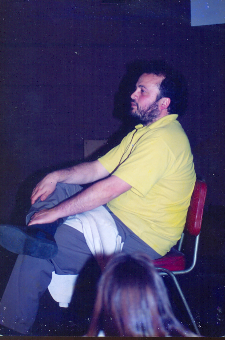 Director Gonzalo Justiniano; invitado; año 1994